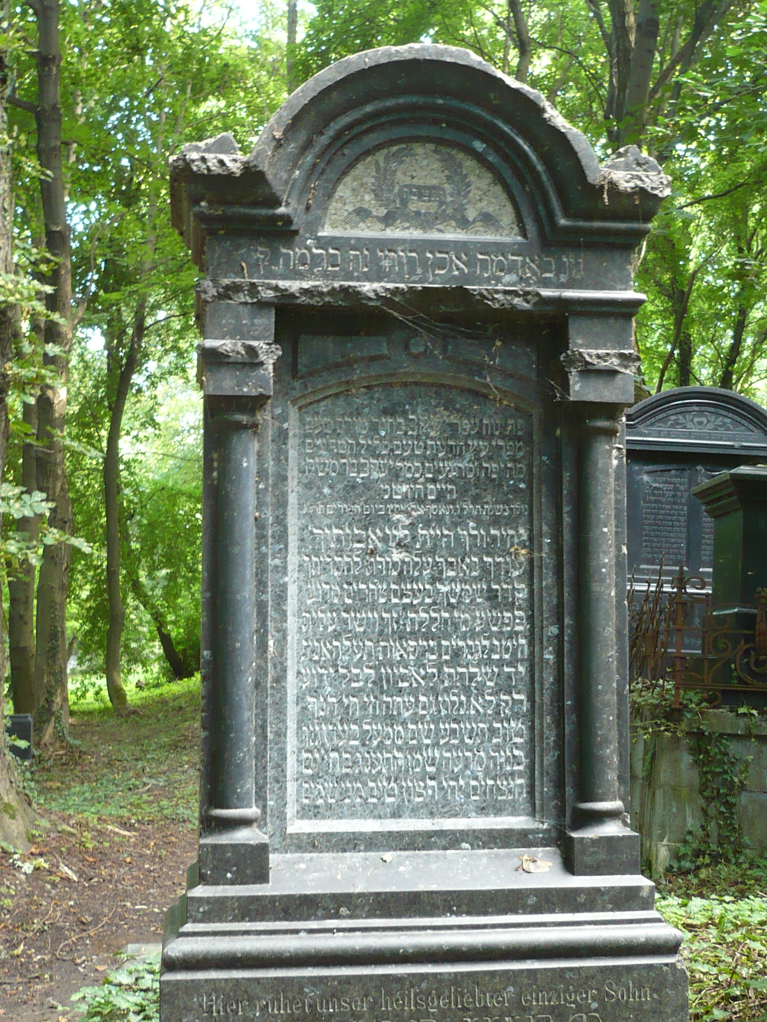 Przemyśl, nowy cmentarz żydowski